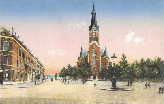 Oranjeboomstraat met N.H. Wilhelminakerk rond 1900, foto van ansichtkaart, fotograaf onbekend